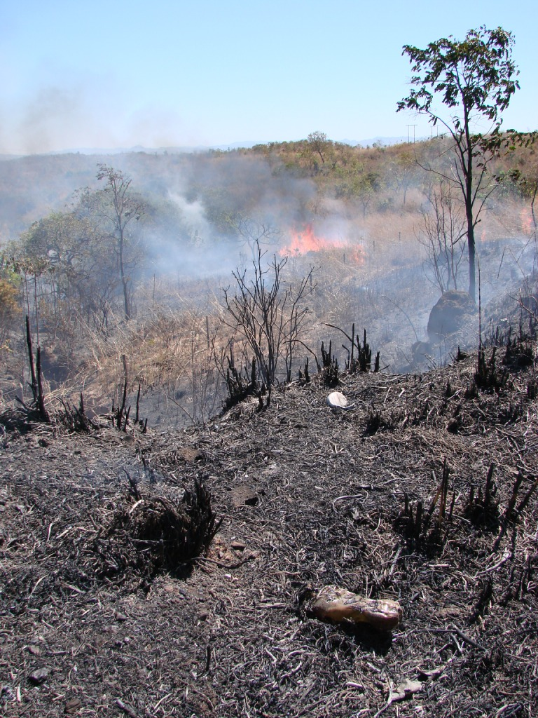 BR 080 - Padre Bernardo - Goiás - Brasil.